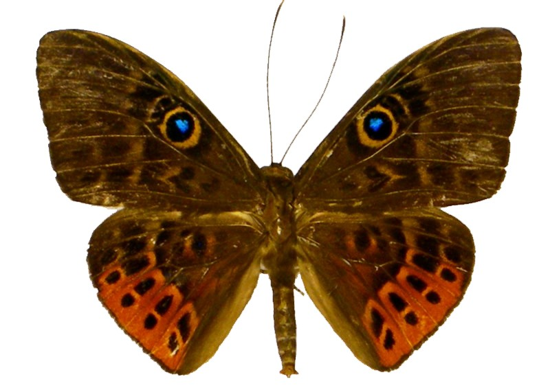 Eurybia patrona, Manzanillo, Costa Rica, Jan. 2004.